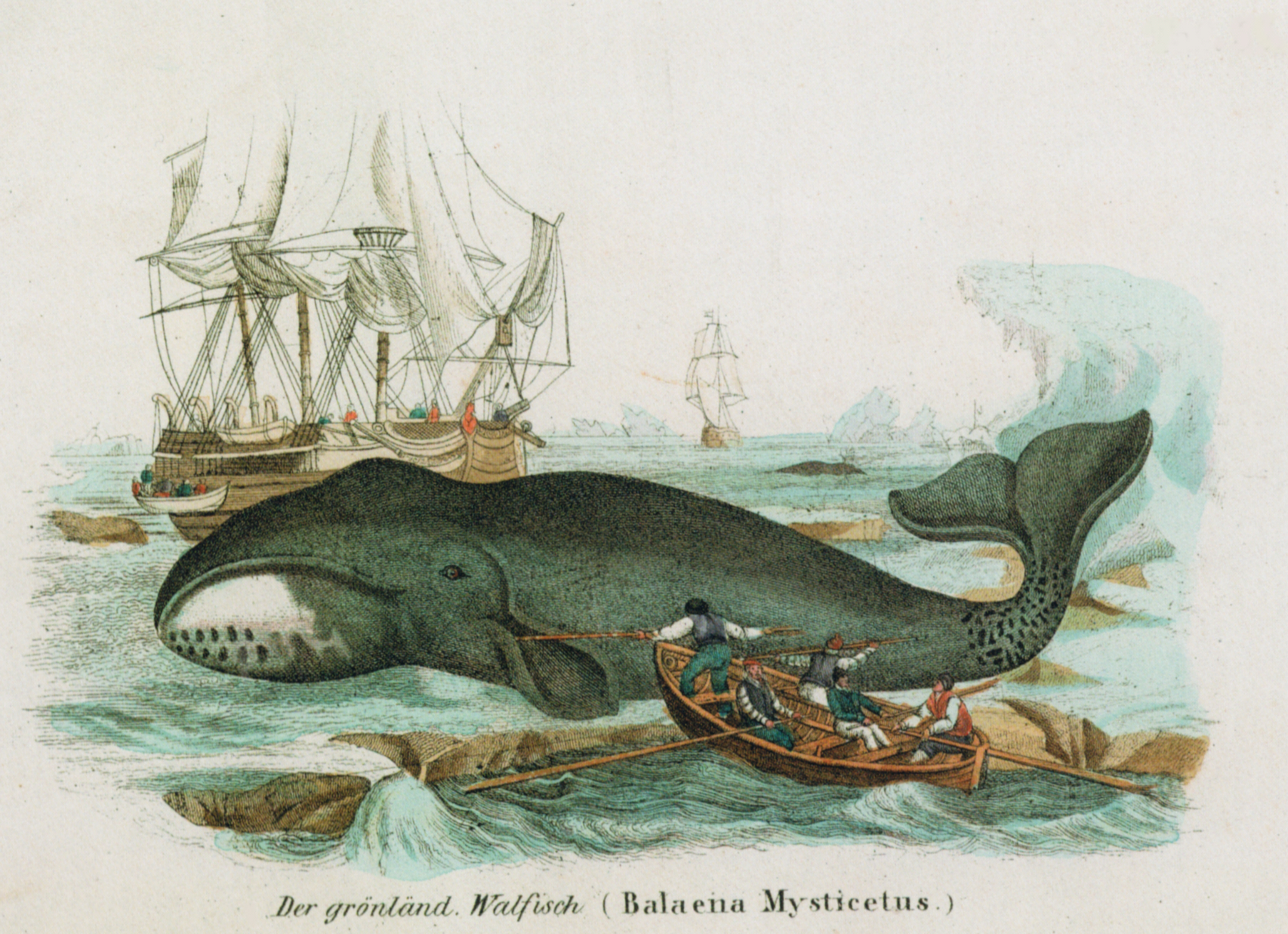 Der grönländische Walfisch, Holzstich um 1840